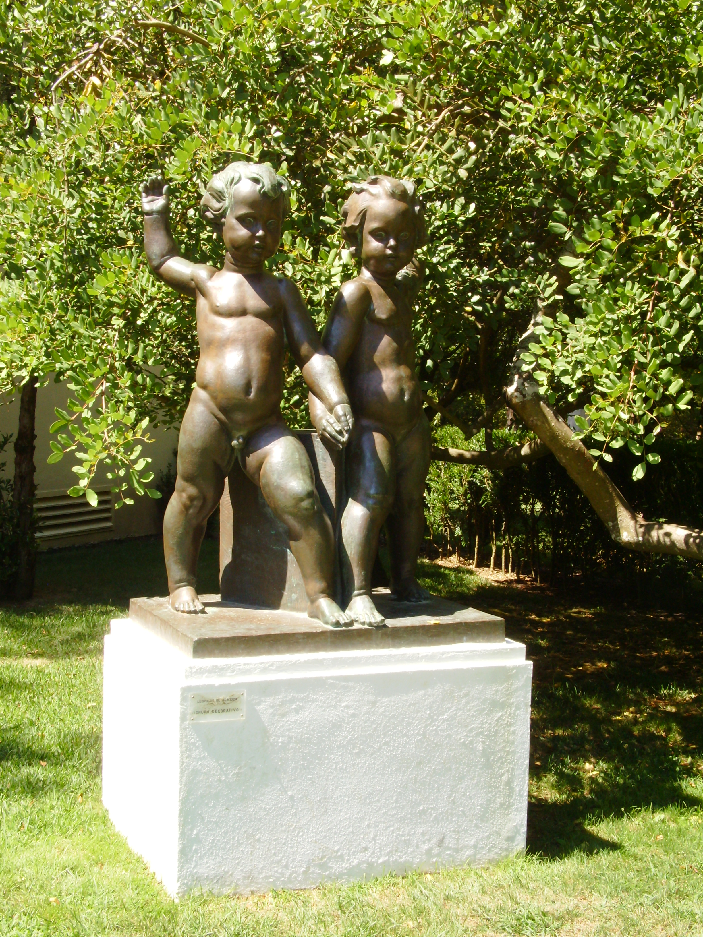 "Grupo Decorativo": bronze por Leopoldo de Almeida. Parque D. Carlos I, Caldas da Rainha, Distrito de Leiria, Portugal.